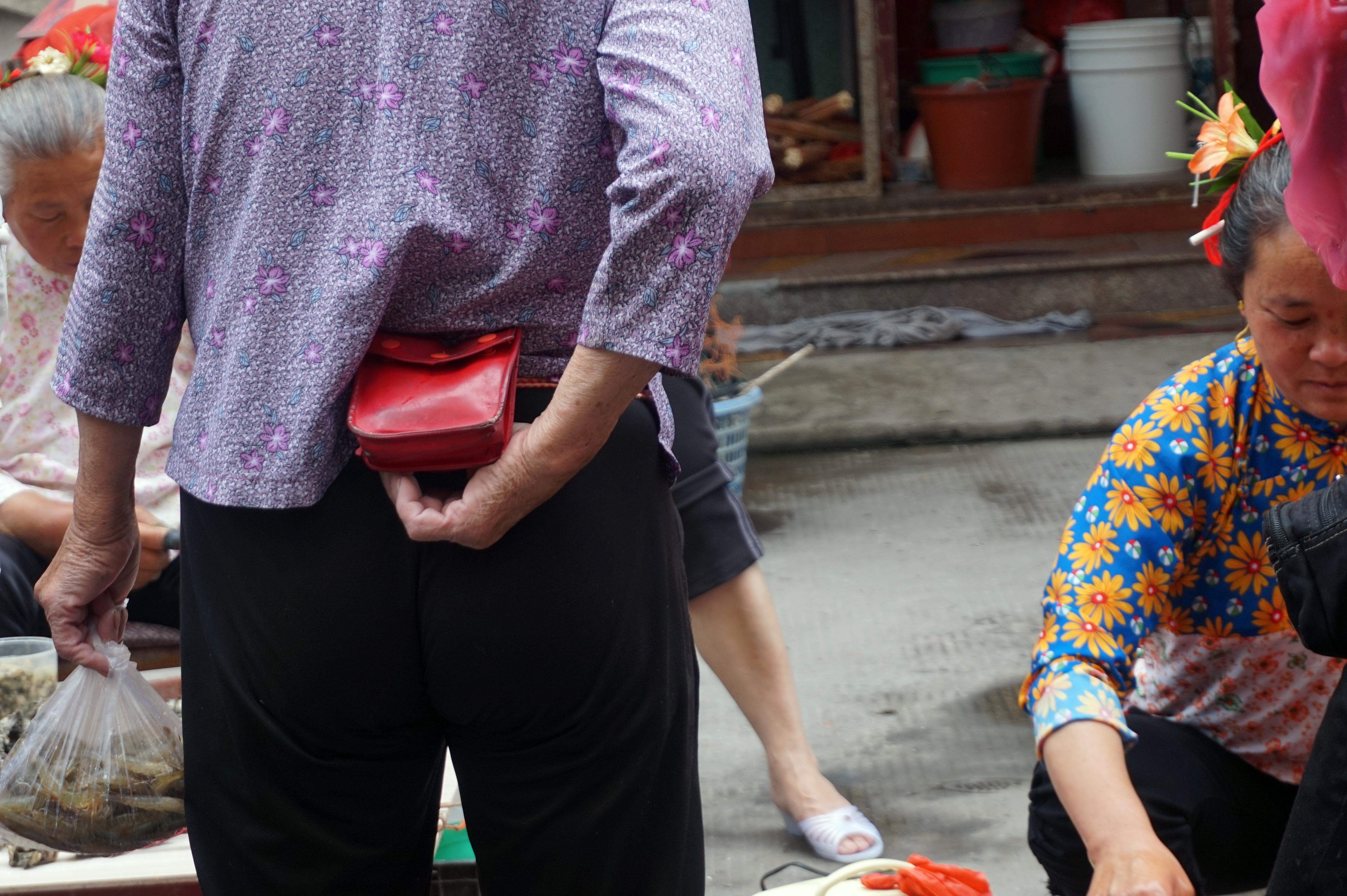 泉州蟳埔女红腰包。